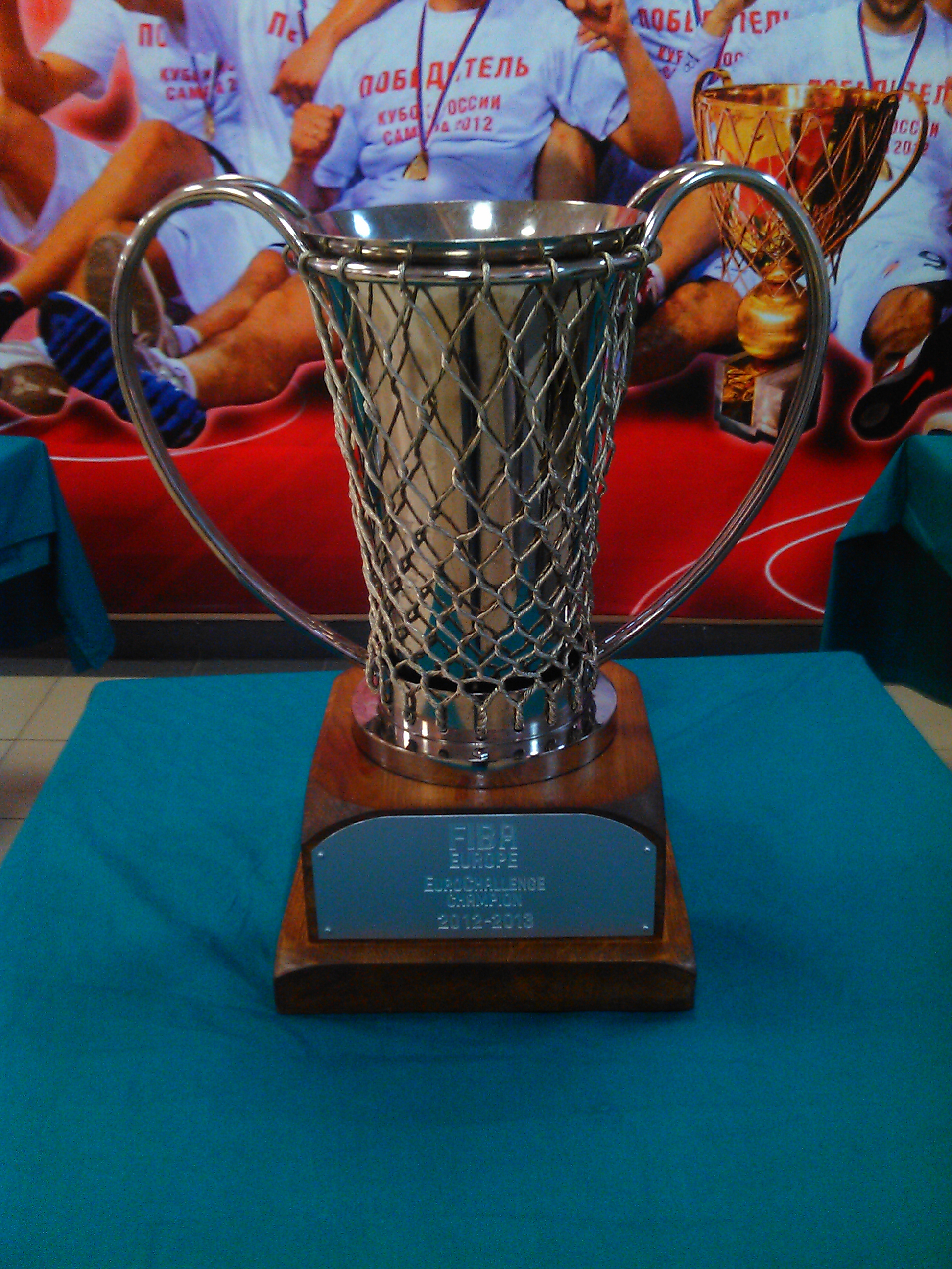 Кубок Вызова по баскетболу 2012-2013 в спортивном комплексе МТЛ-Арена в Самаре.